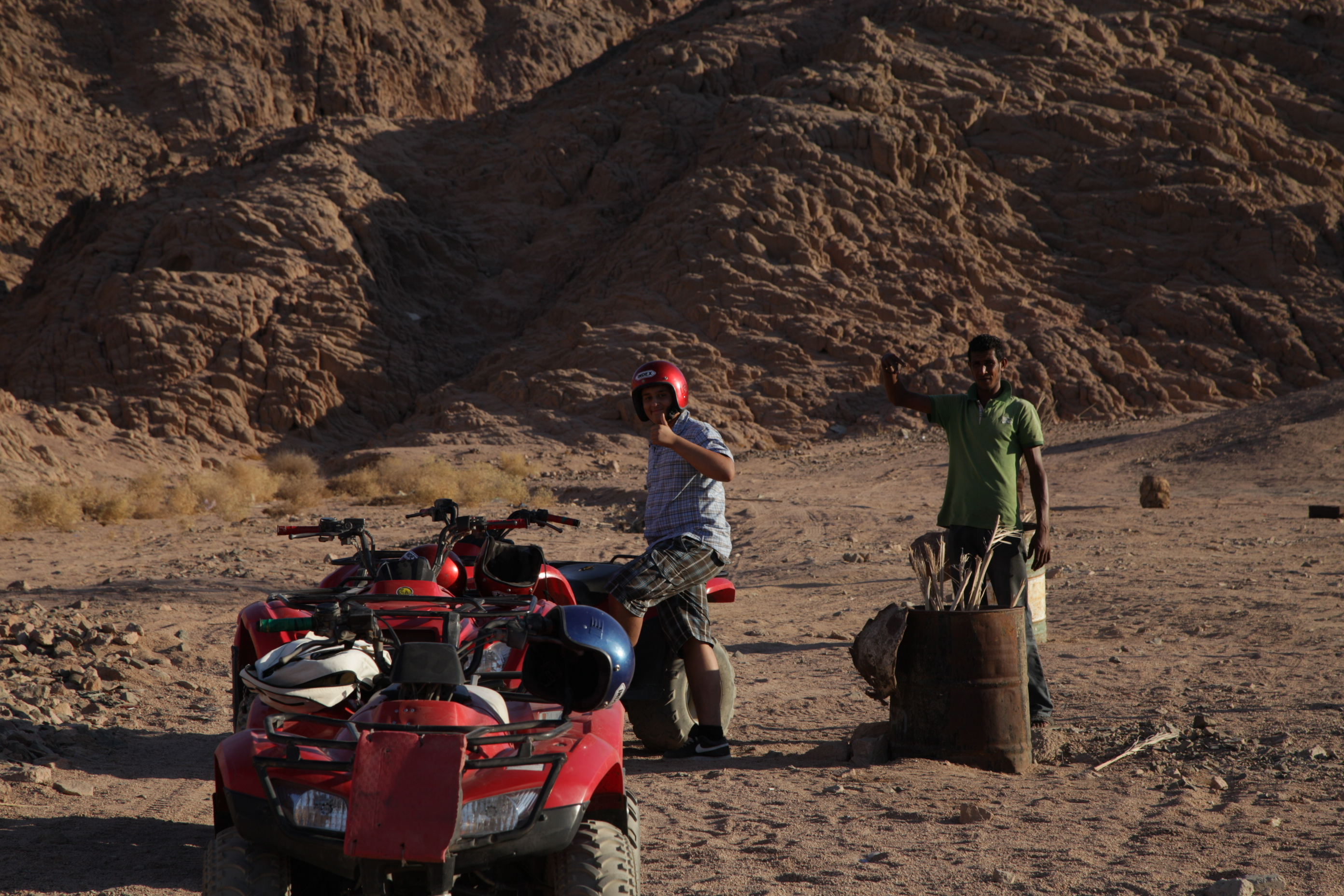 Ballade en quad dans le désert